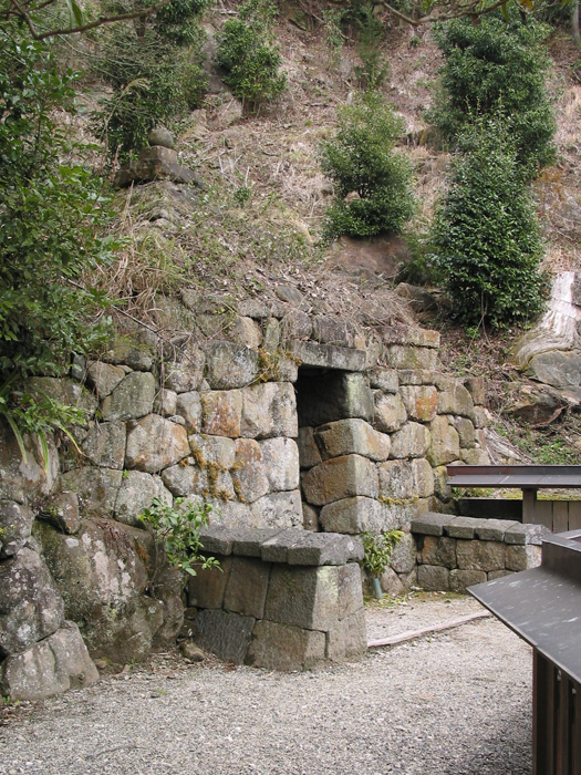 Sekishitsu at Buturyū-ji Temple, had Japanese important cultural property status, at Haibara-ku Uda, Nara, Japan. 仏隆寺にある石室（重要文化財） 奈良県宇陀市榛原区赤埴で撮影